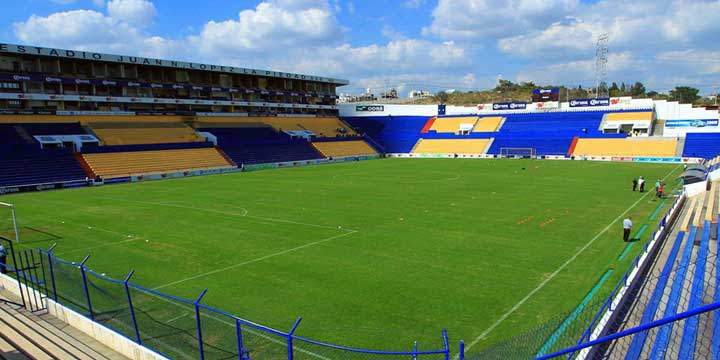 Estadio Juan N Lopez